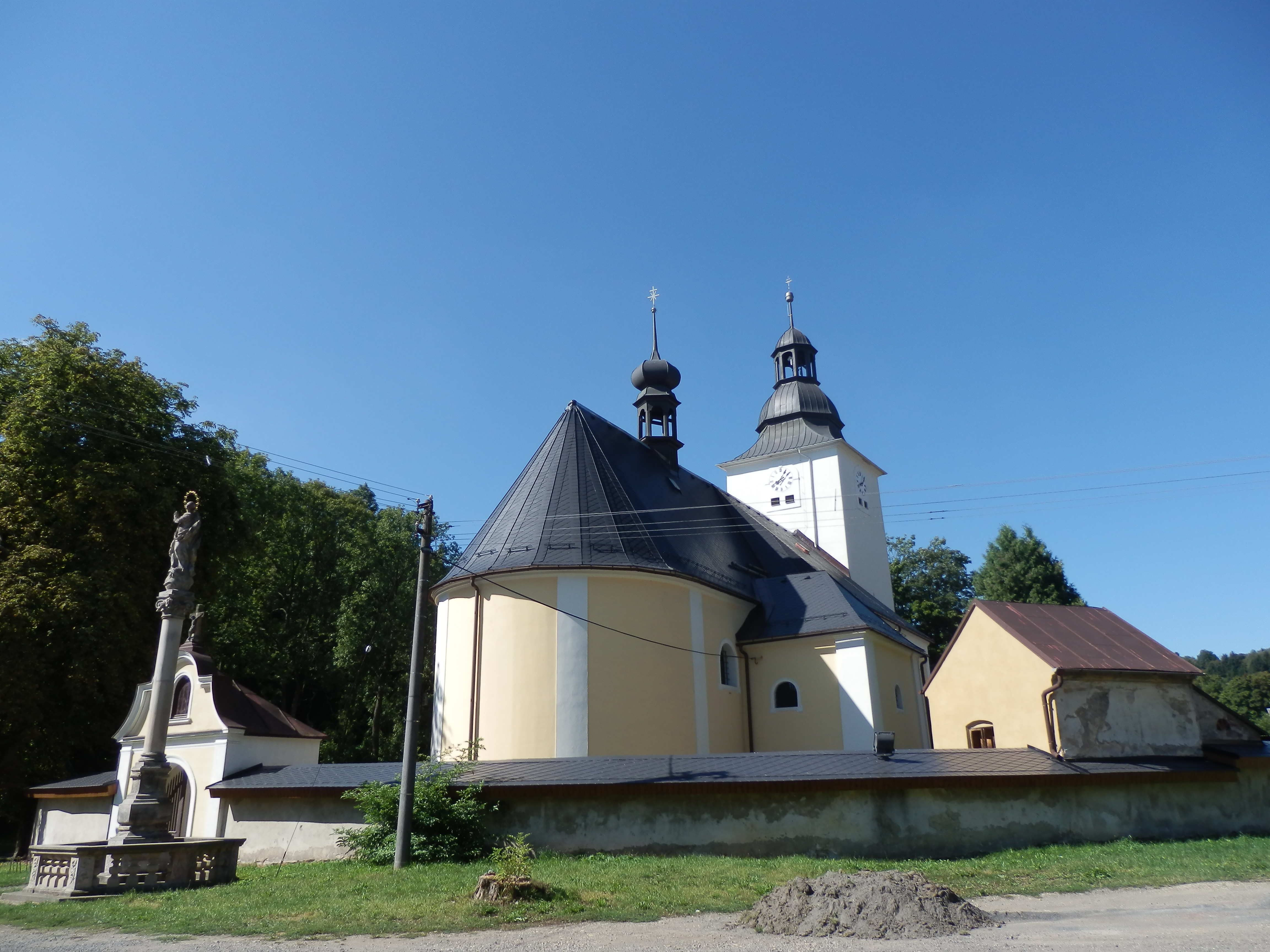 Kostel sv. Ondřeje (Vendolí), Vendolí 325